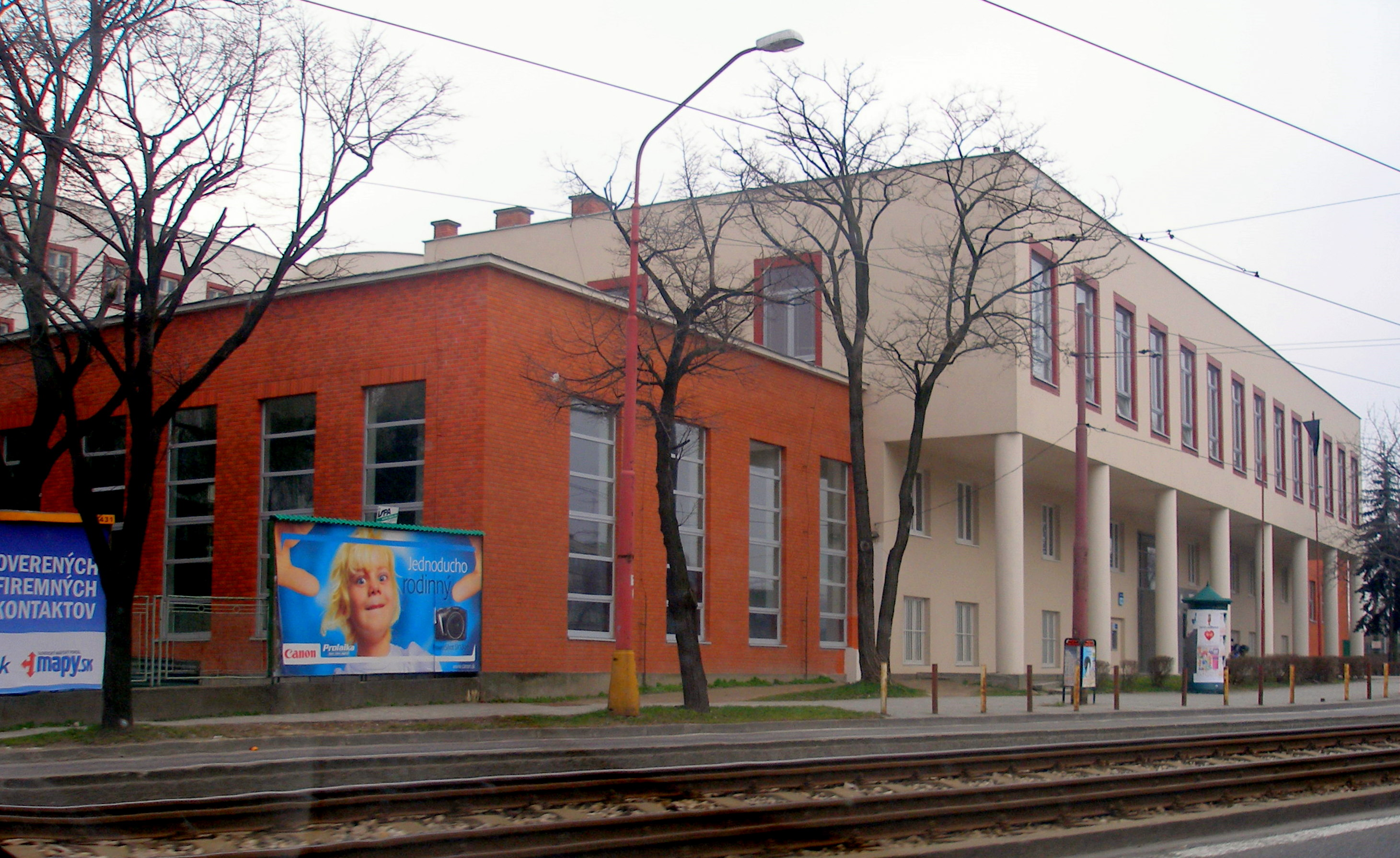 Vysokoškolský areál Lafranconi Univerzity Komenského v Bratislave.